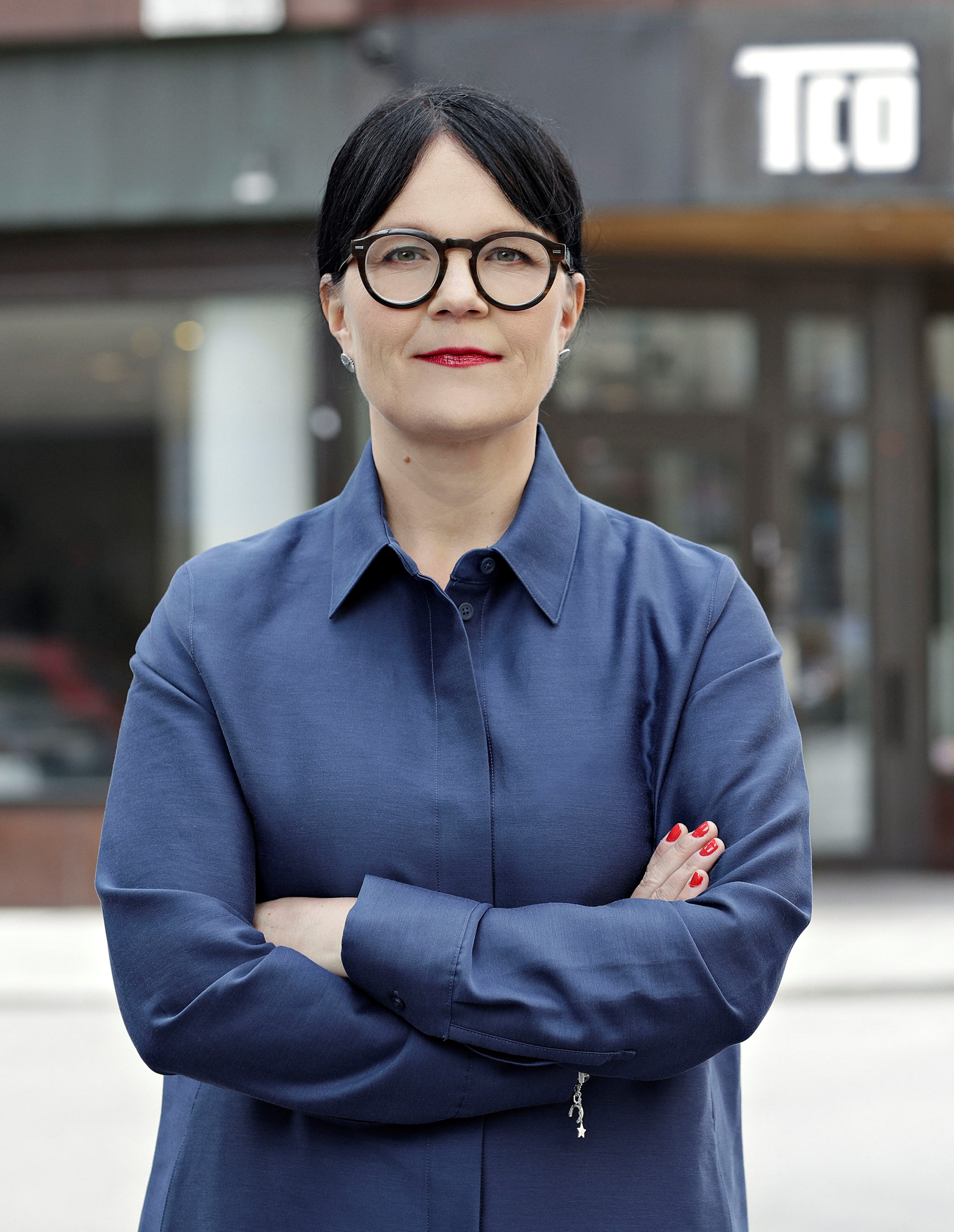 TCO:s ordförande Therese Svanström Foto: Eva Edsjö